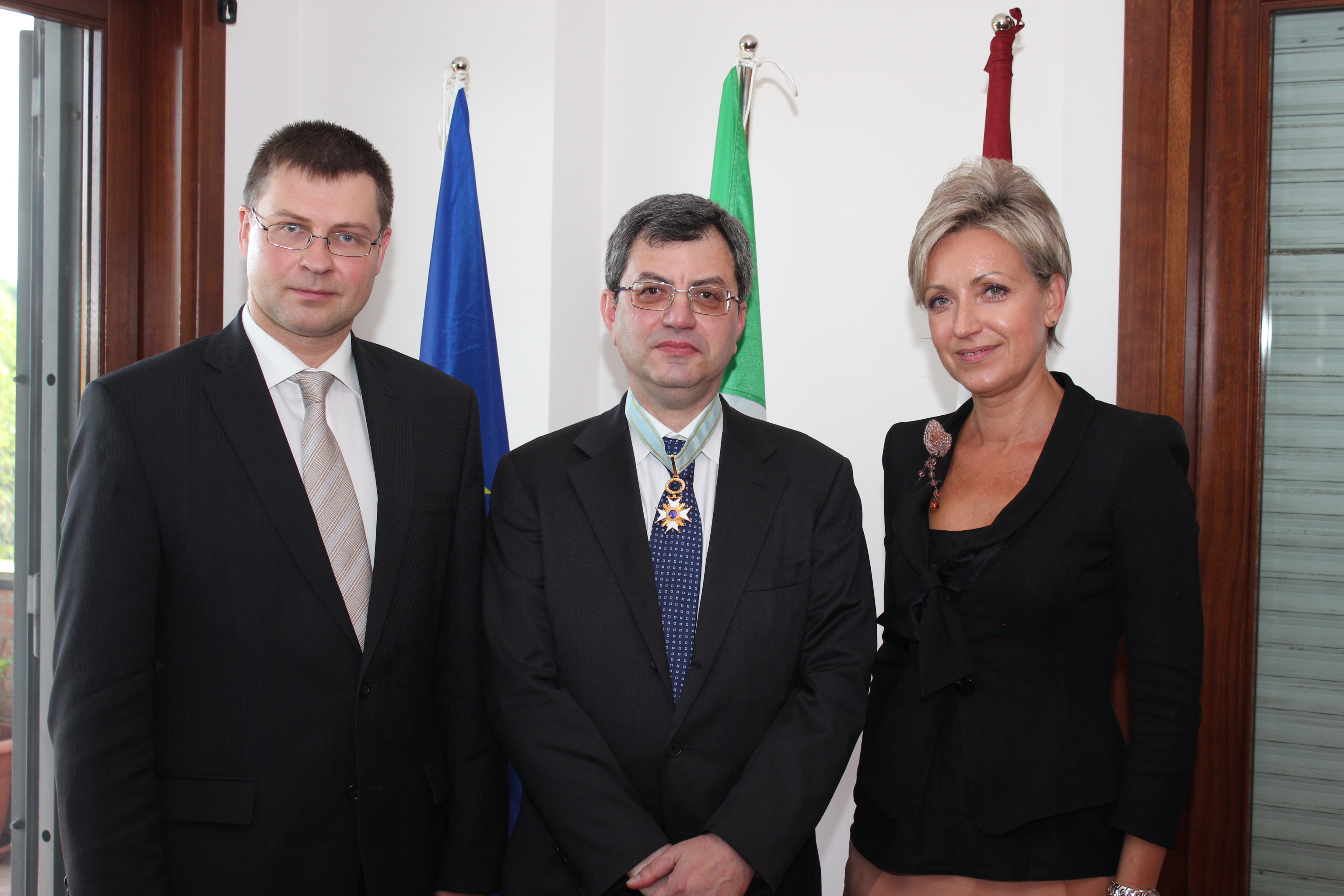 Ministru prezidents Valdis Dombrovskis bijušajam Itālijas vēstniekam Latvijā Frančesko Pučio pasniedz Triju Zvaigžņu Ordeni. No kreisās: V.Dombrovskis. F. Pučio un Latvijas vēstniece Itālijā Elita Kuzma